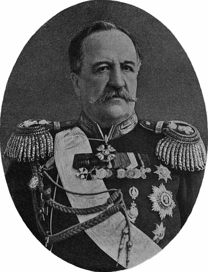 Граф Илларион Иванович Воронцов-Дашков.